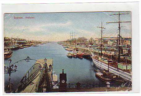 1911 Old images